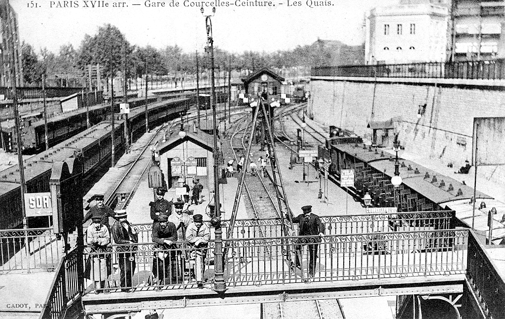 Vue des quais de la gare de Courcelles-Ceinture, en contrebas de la rue Philibert Delorme, dans les années 1900.